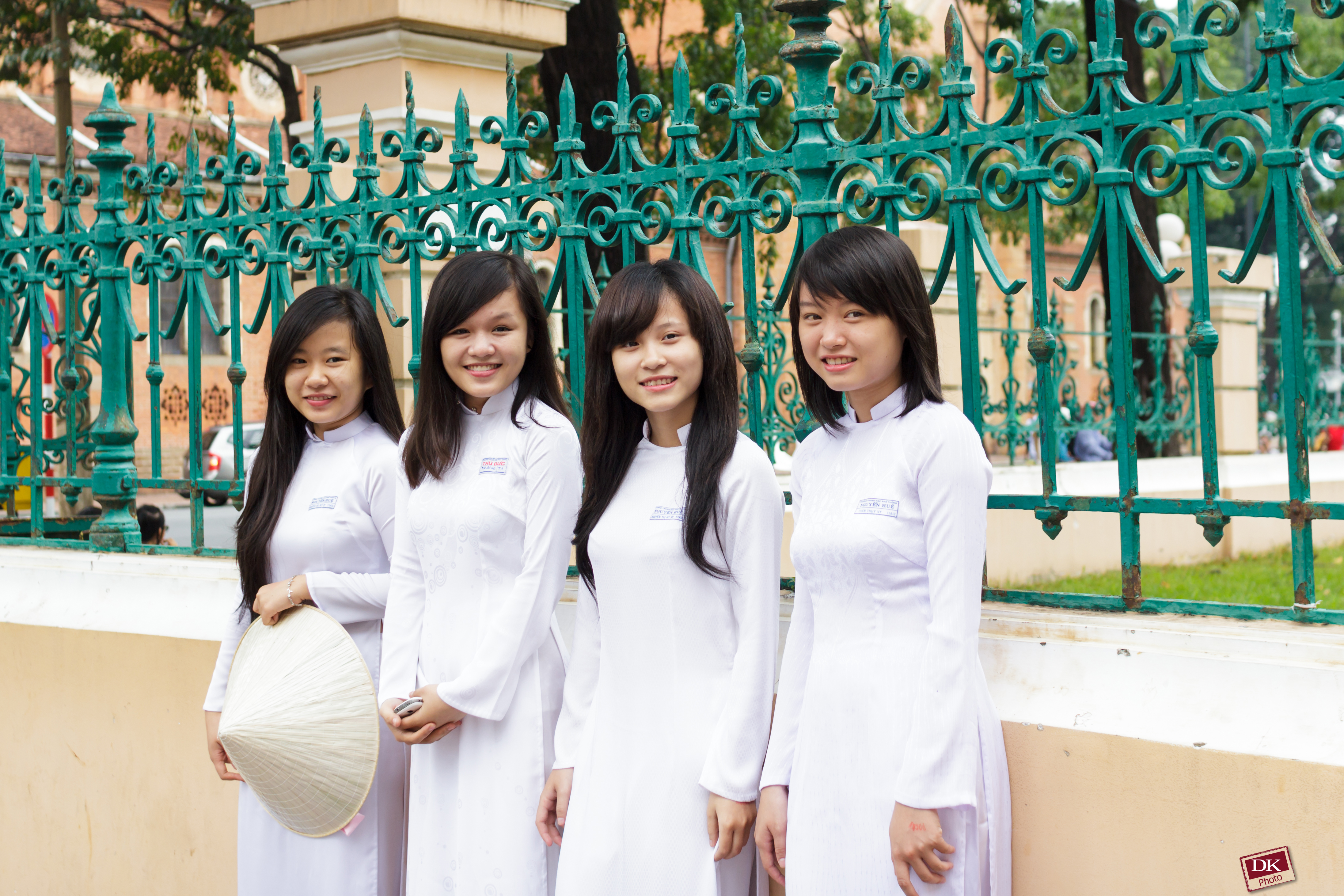 Female students wearing áo dài